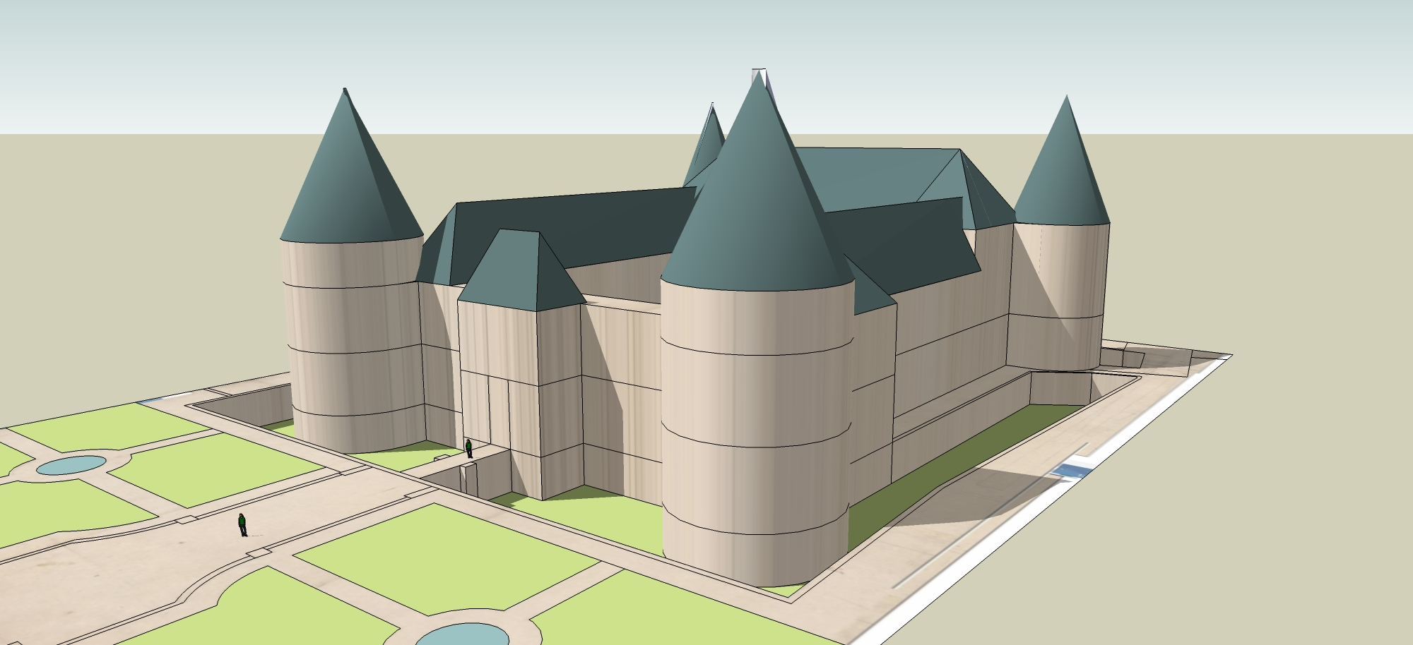 Schéma restituant le volume du château de Nanteuil.